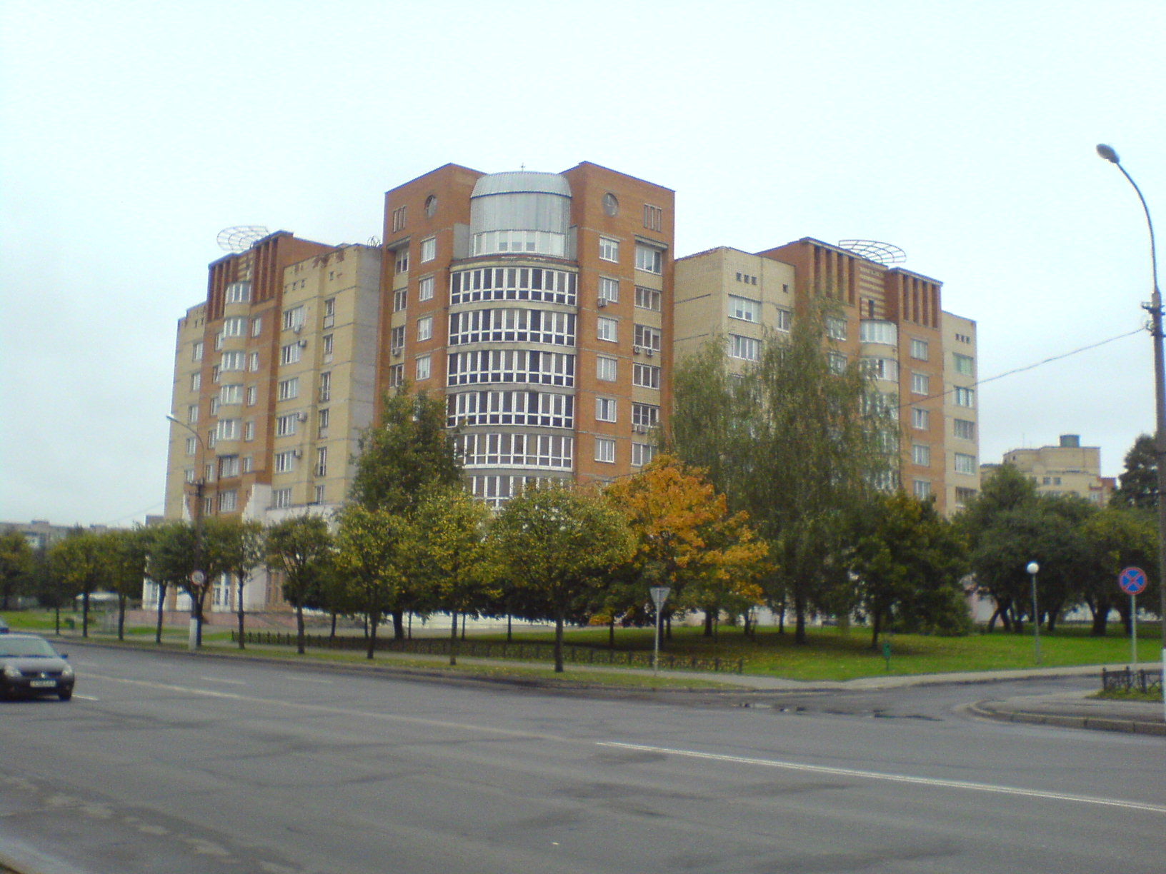 Lieninski District, Mogilev, Belarus